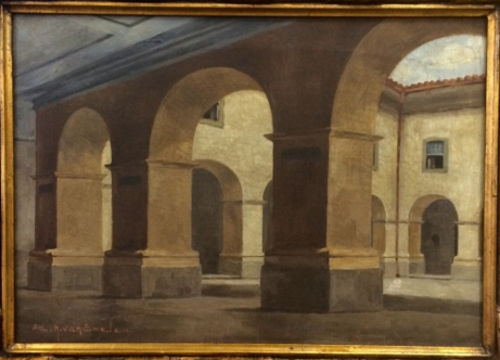 Pintura feita por Adrien Henri Vital van Emelen